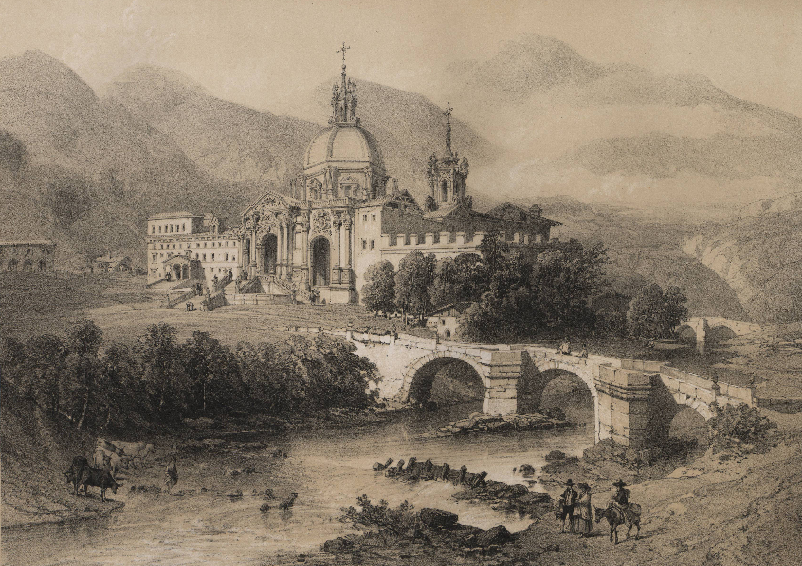 San Ignacio de Loyola en Guipúzcoa.